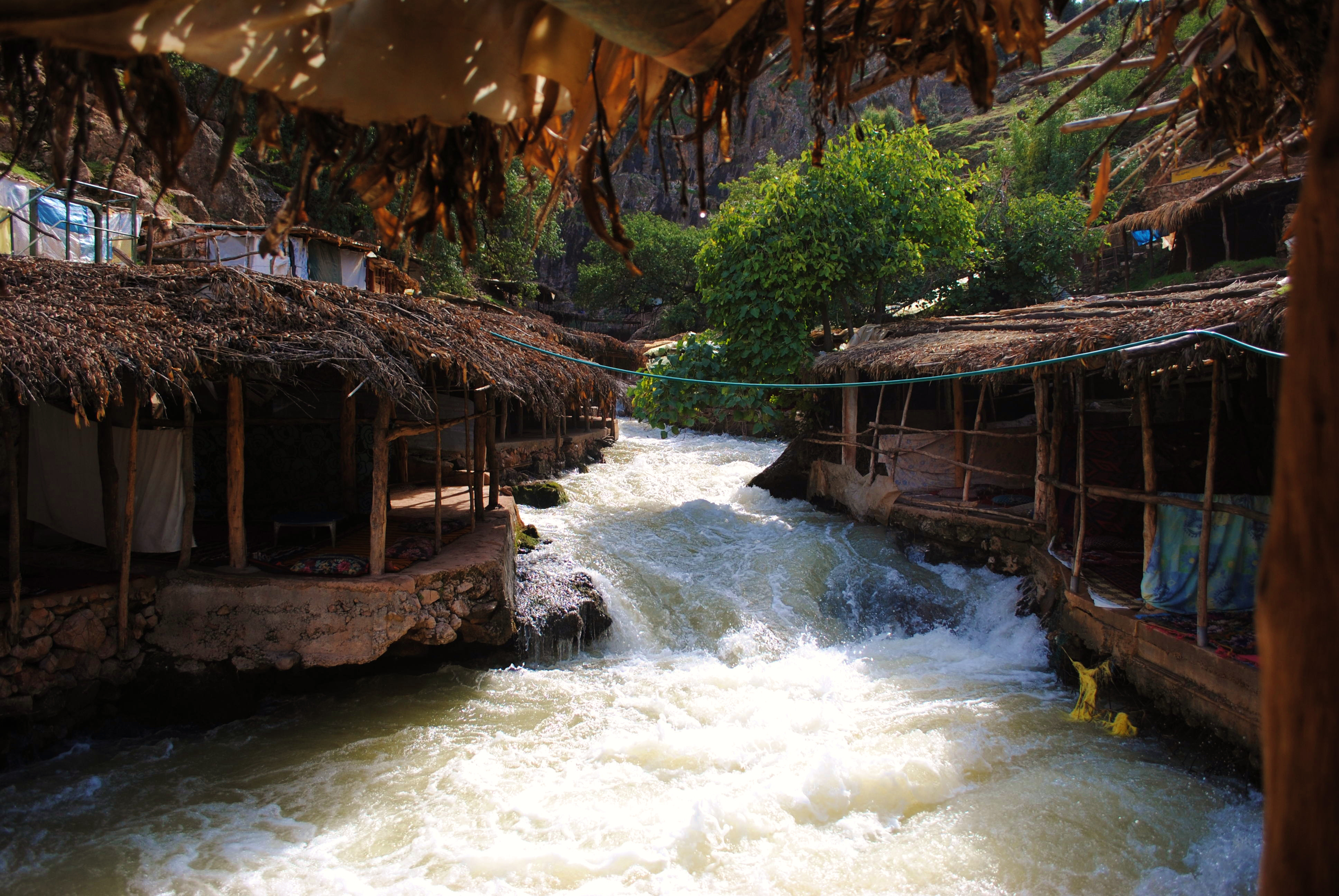 Aux sources d'Oum Rabii, Maroc